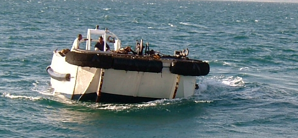 Tuna Purser skiff boat. Skiff de thonier senneur congélateur.